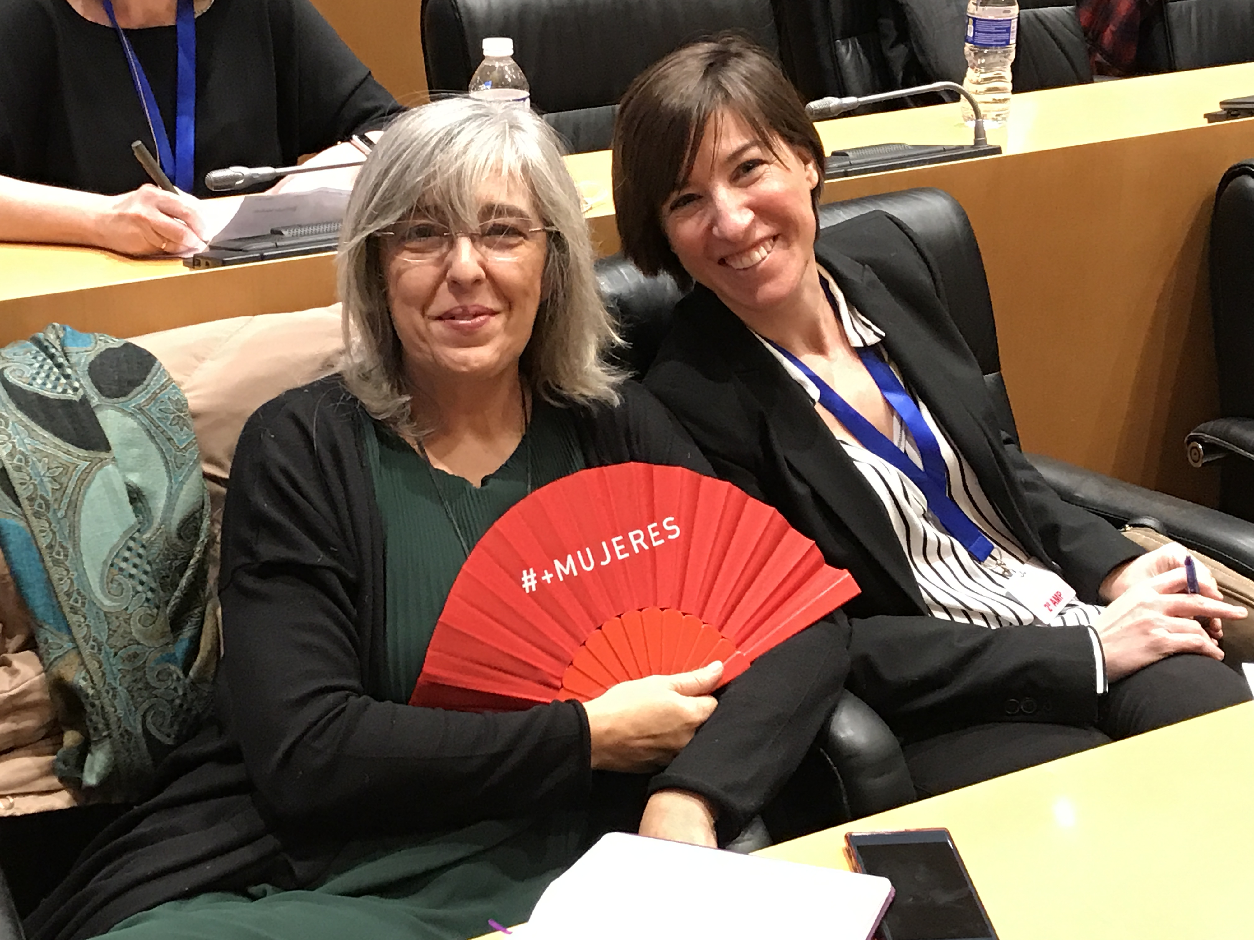 Jornada Igualdad en las Radiotelevisiones Públicas. Congreso de Diputados 2018 - Ugt RTVE